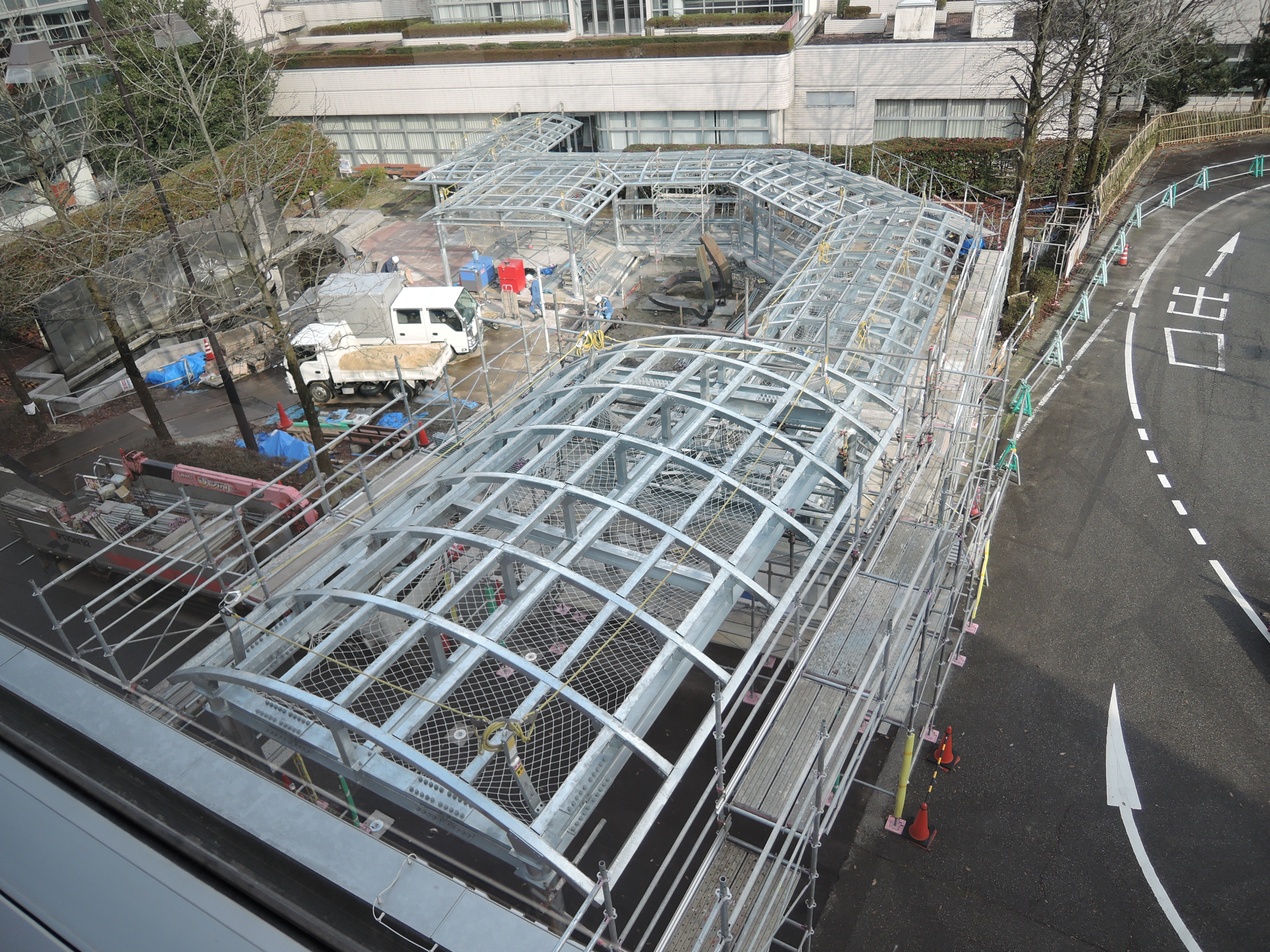 富山空港と県総合体育センターの間に建設中の連絡通路